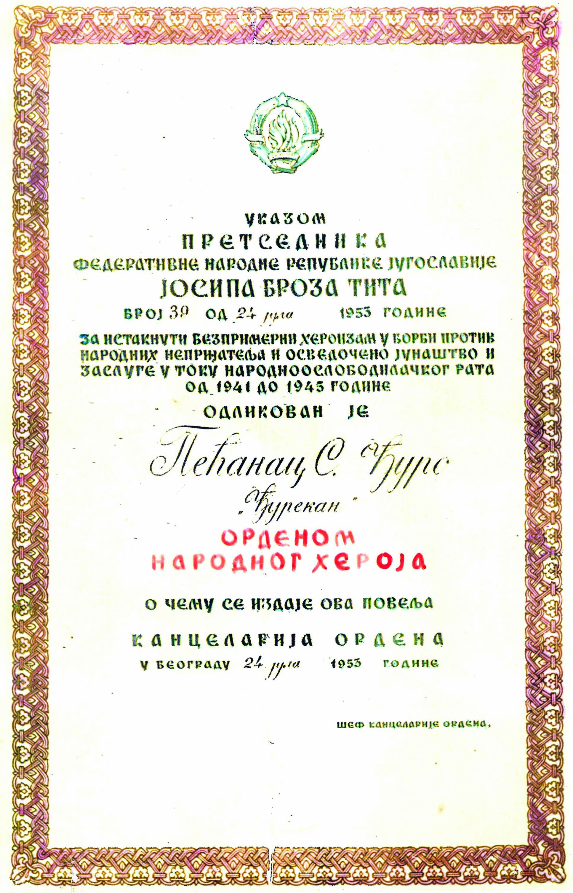 Povelja - Orden narodnog heroja